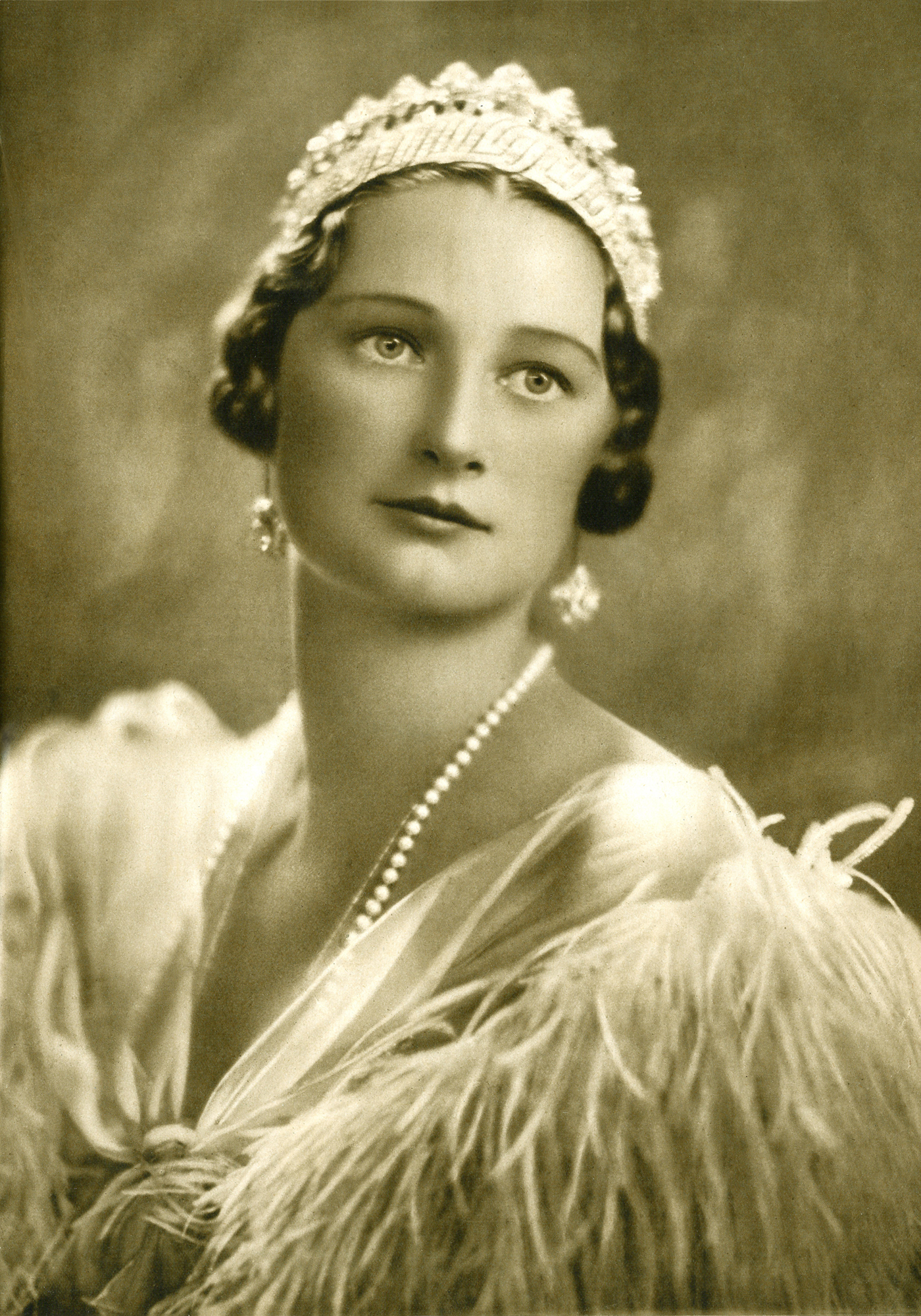 Astrid av Sverige